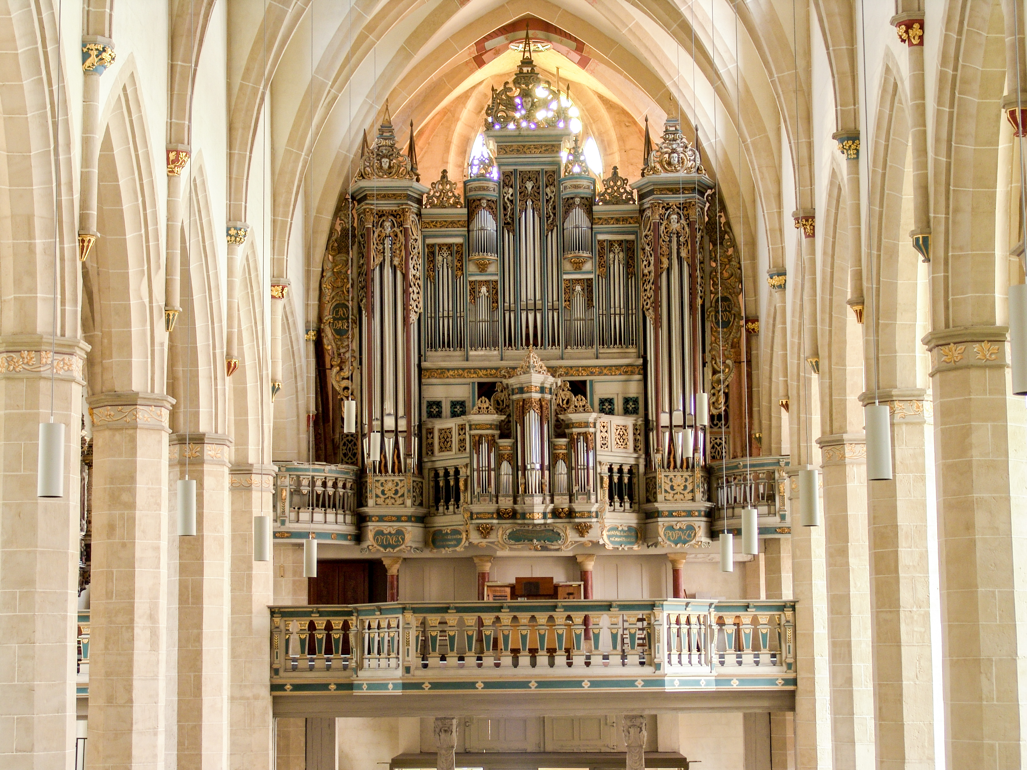 Predigerkirche in Erfurt